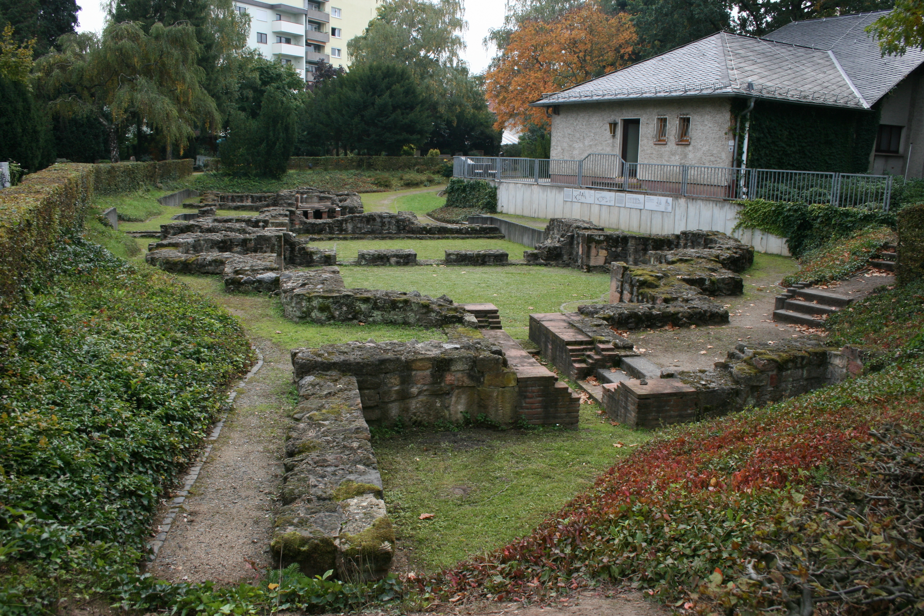 Roemisches Kastellbad Hanau-Salisberg, Hessen, Ansicht des Kastellbades im heutigen Friedhof Kesselstadt. Blick von W.